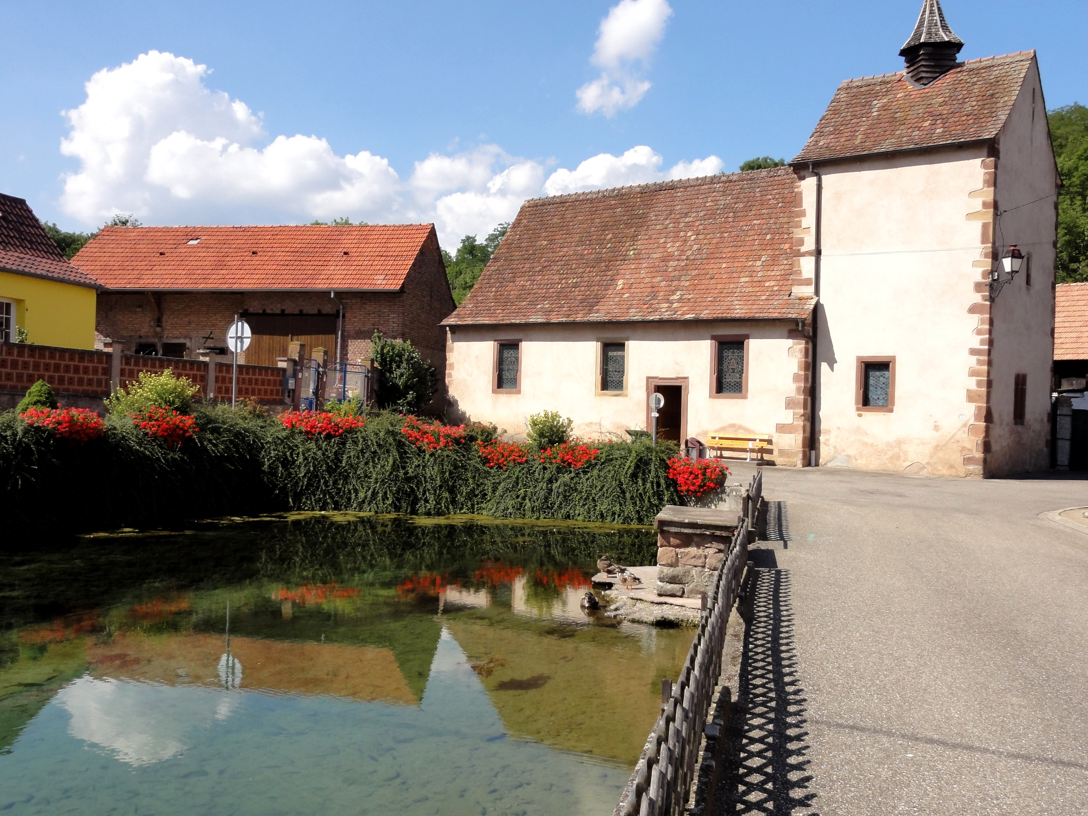 Alsace, Bas-Rhin, Kuttolsheim, Sources de la Souffel et Chapelle Sainte-Barbe (PA00084765, IA67006340).